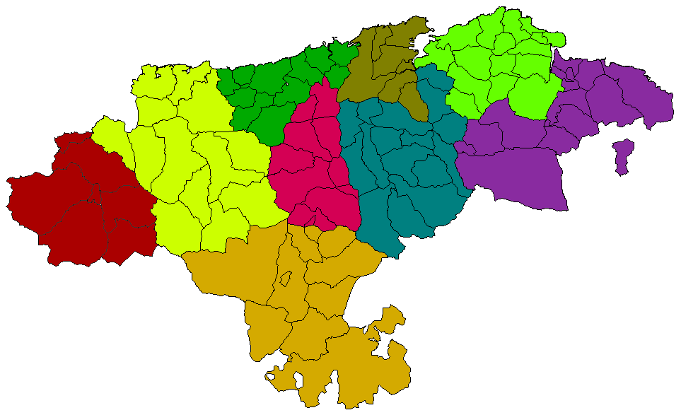 Zonas turísticas de Cantabria de acuerdo con la consejería.